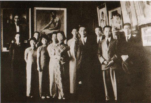 1935年颜文梁（前排右二）与胡粹中（前排右三）、黄觉寺（前排右一）及部分苏州美术专科学校的同学在一起。